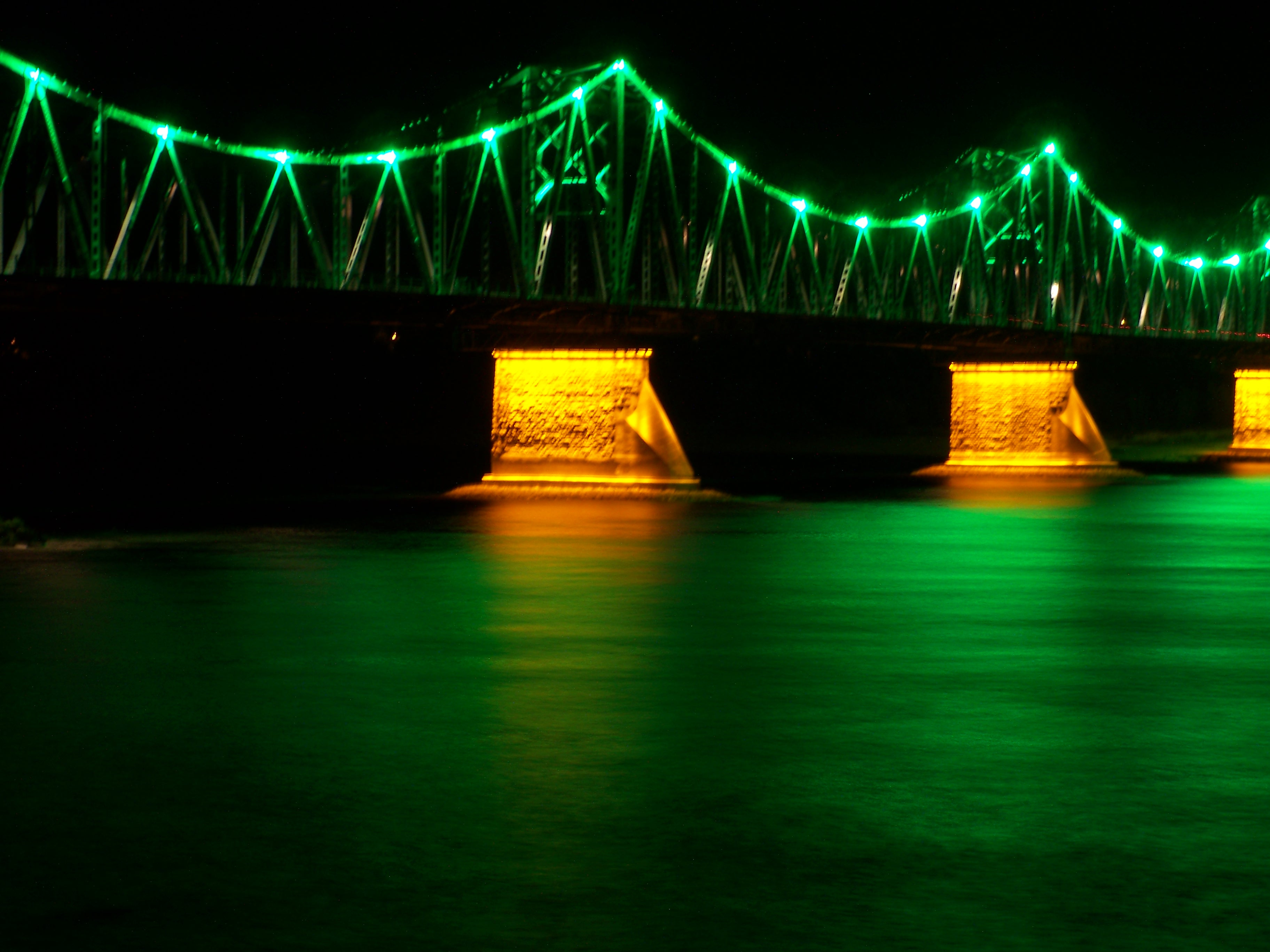 Włocławski most na Wiśle (2009 r.)